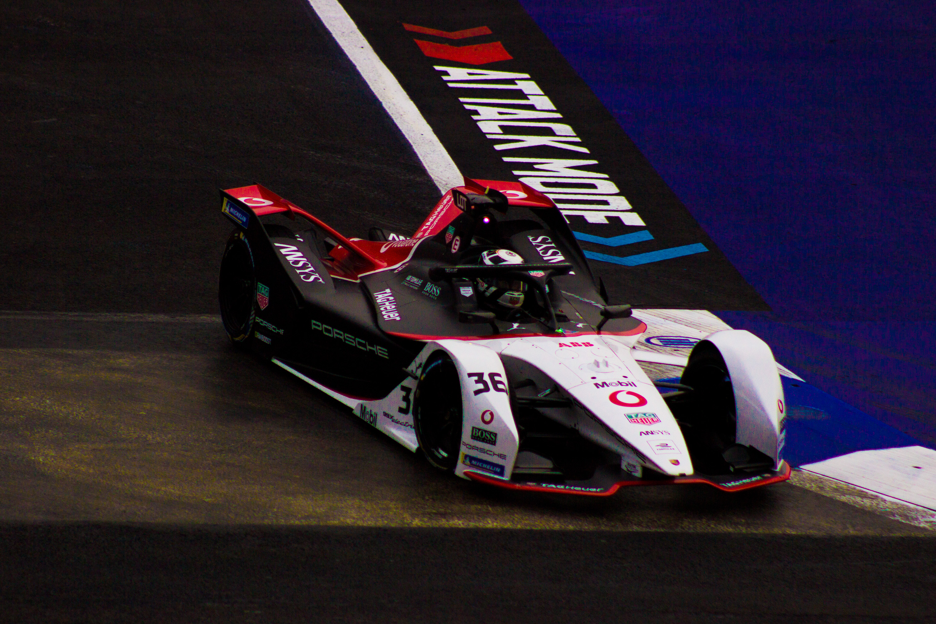 2019-20 FIA Formula E, CBMM Niobium Mexico City E-Prix 2020, Autódromo Hermanos Rodríguez, Ciudad de México, 15 de febrero 2020